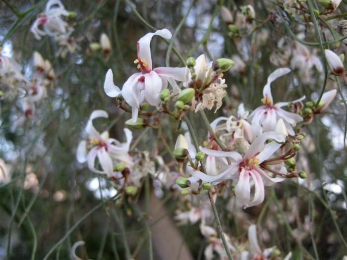 מורינגה רותמית, אחת הנציגות היפות של צמחי עין-גדי, בפריחה מרהיבה ומבושמת